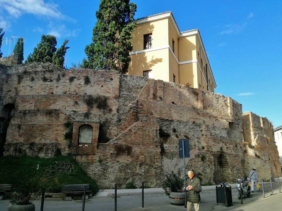 Anfiteatro romano di Interamnia in Via Irelli